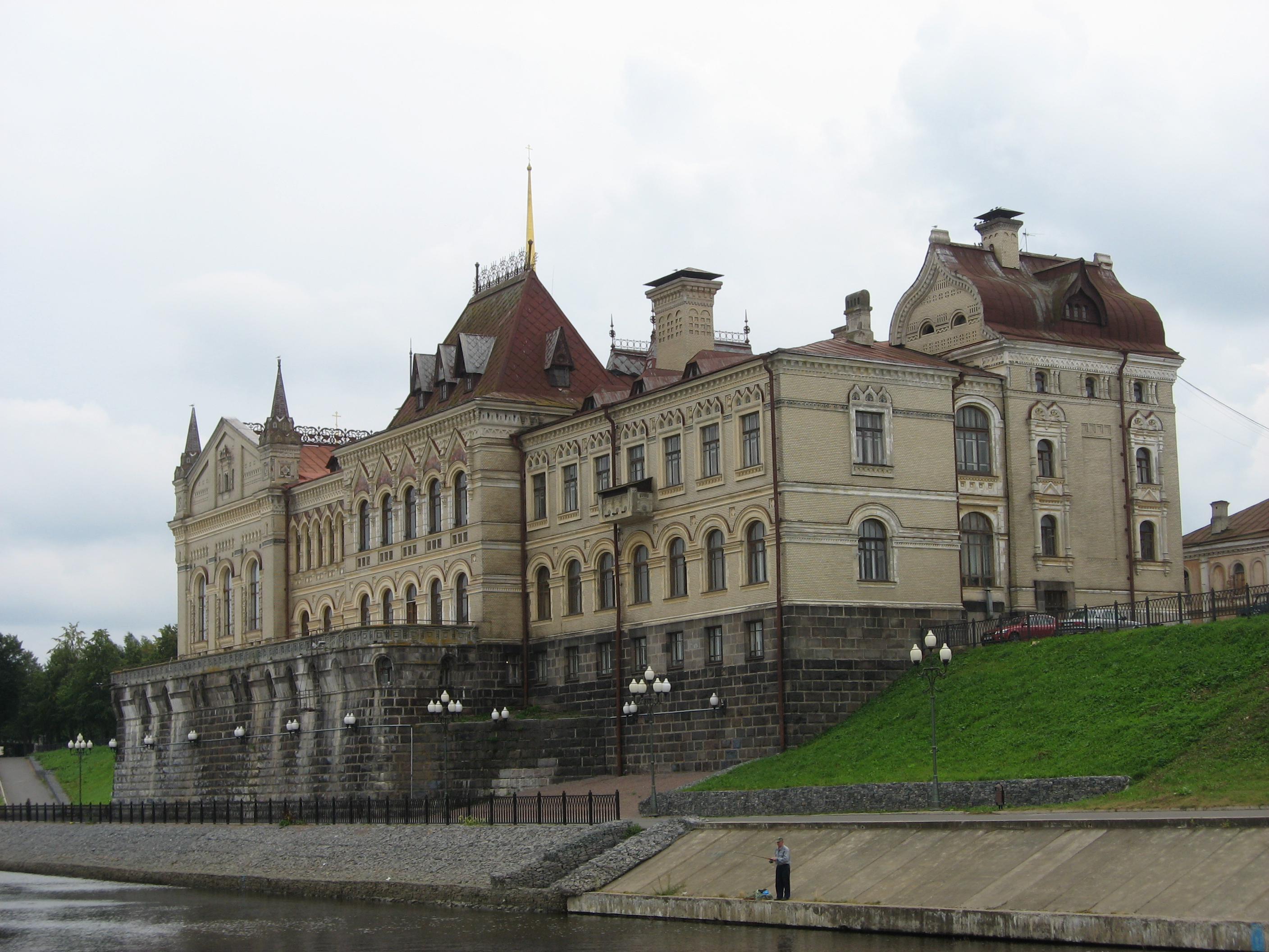 Рыбинский историко-художественный и архитектурный музей (музейный комплекс) (Ярославская область, Рыбинск, город Рыбинск)